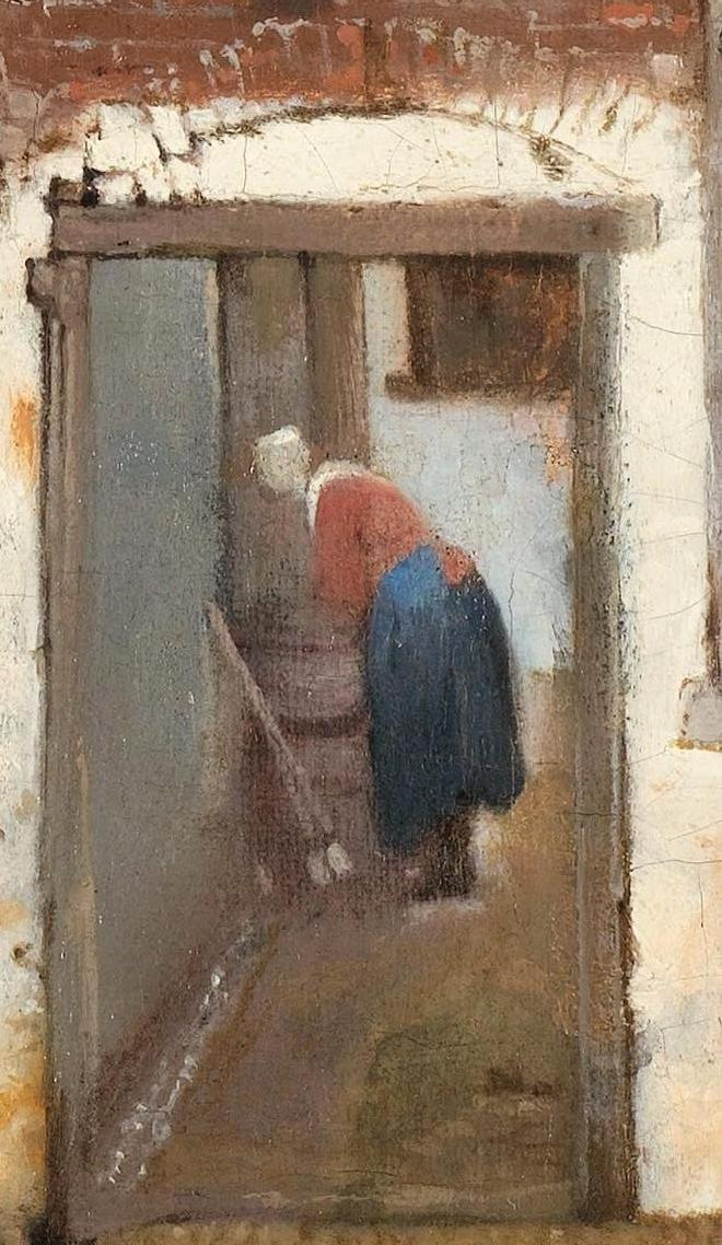 Vermeer La Ruelle detail servante